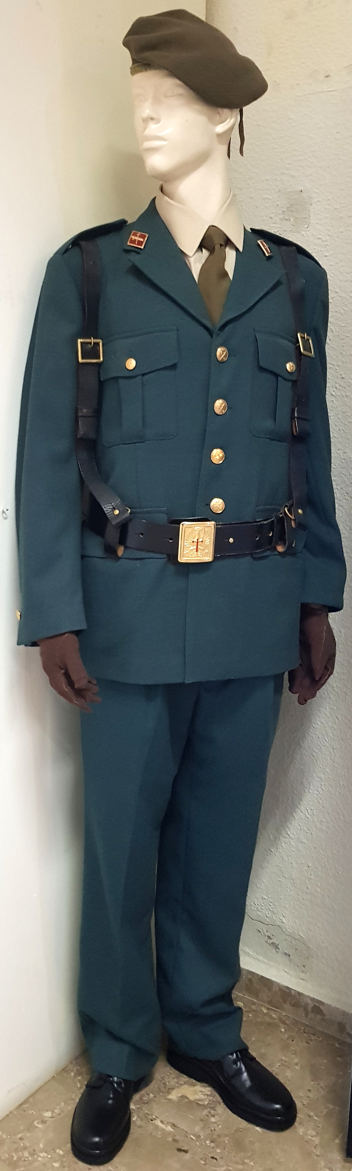 Uniform der 1982-93 bestehenden Guardia Civil Auxiliar. Wehrpflichtige konnten in dieser Einheit einen Teil ihres Dienstes ableisten, die Guardia Civil wollte zugleich Anwärter für ihren Dienst finden.